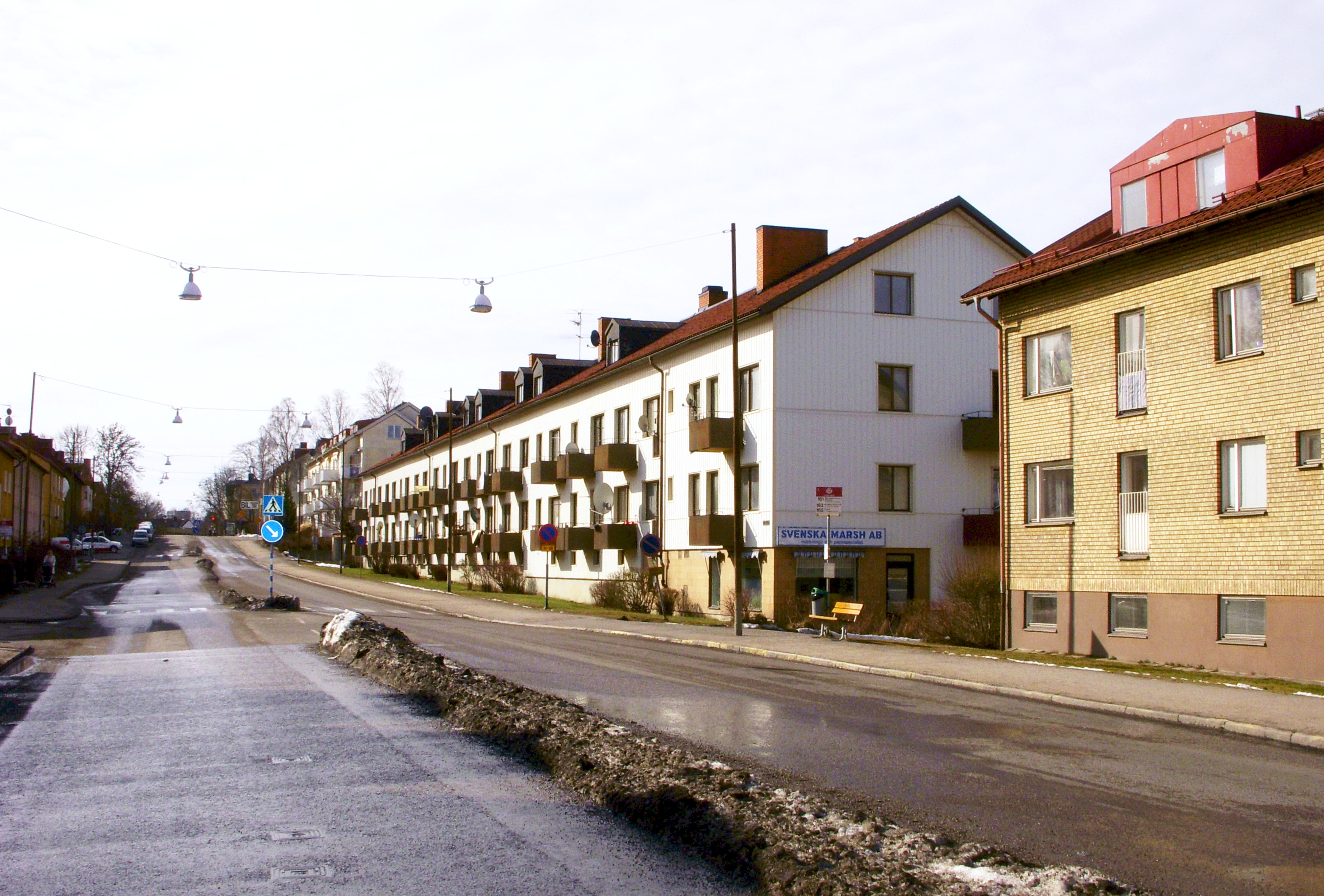 Stadsdelen Örby i södra Stockholm